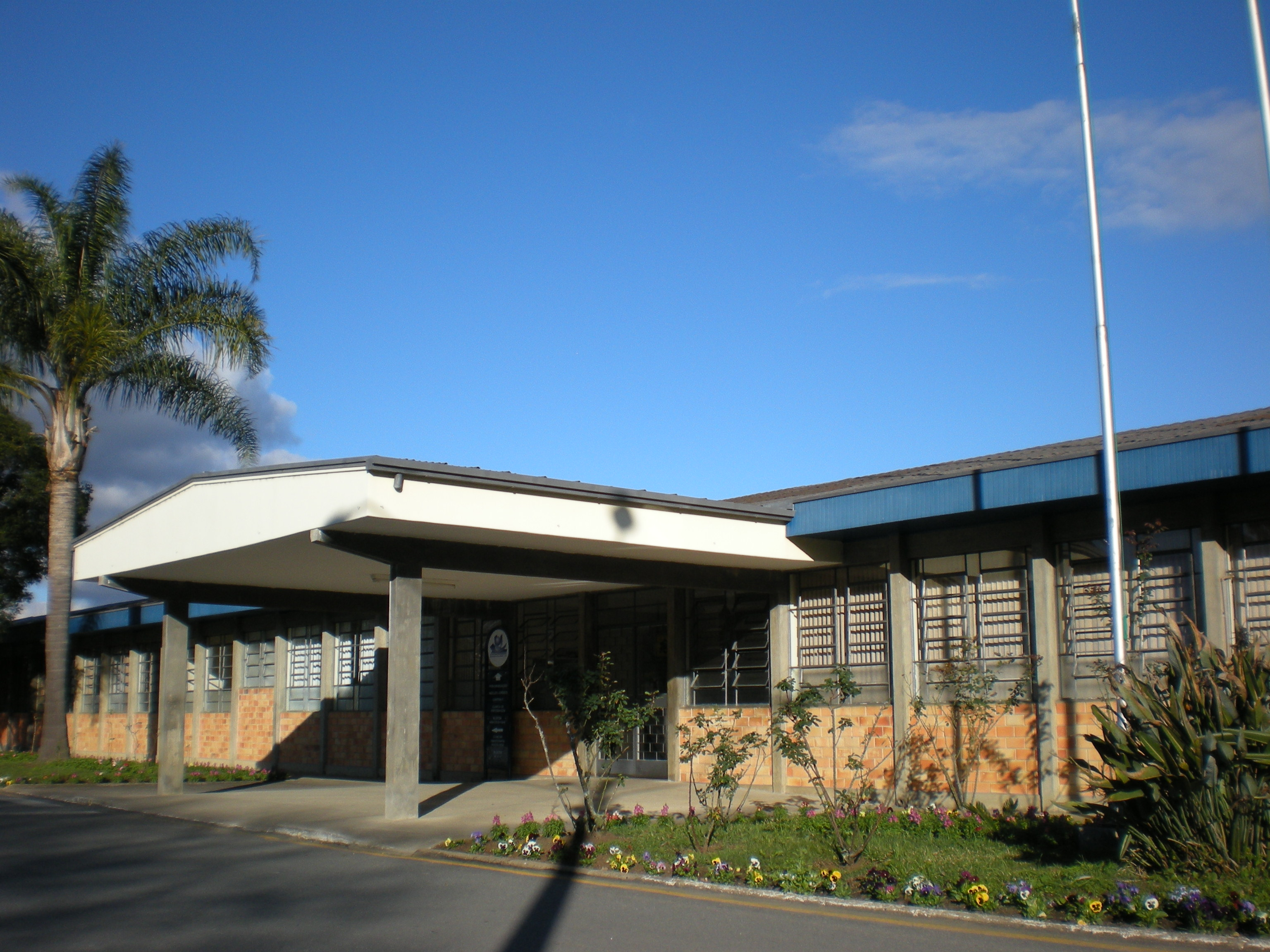 Universidade do Contestado, em Mafra, Santa Catarina